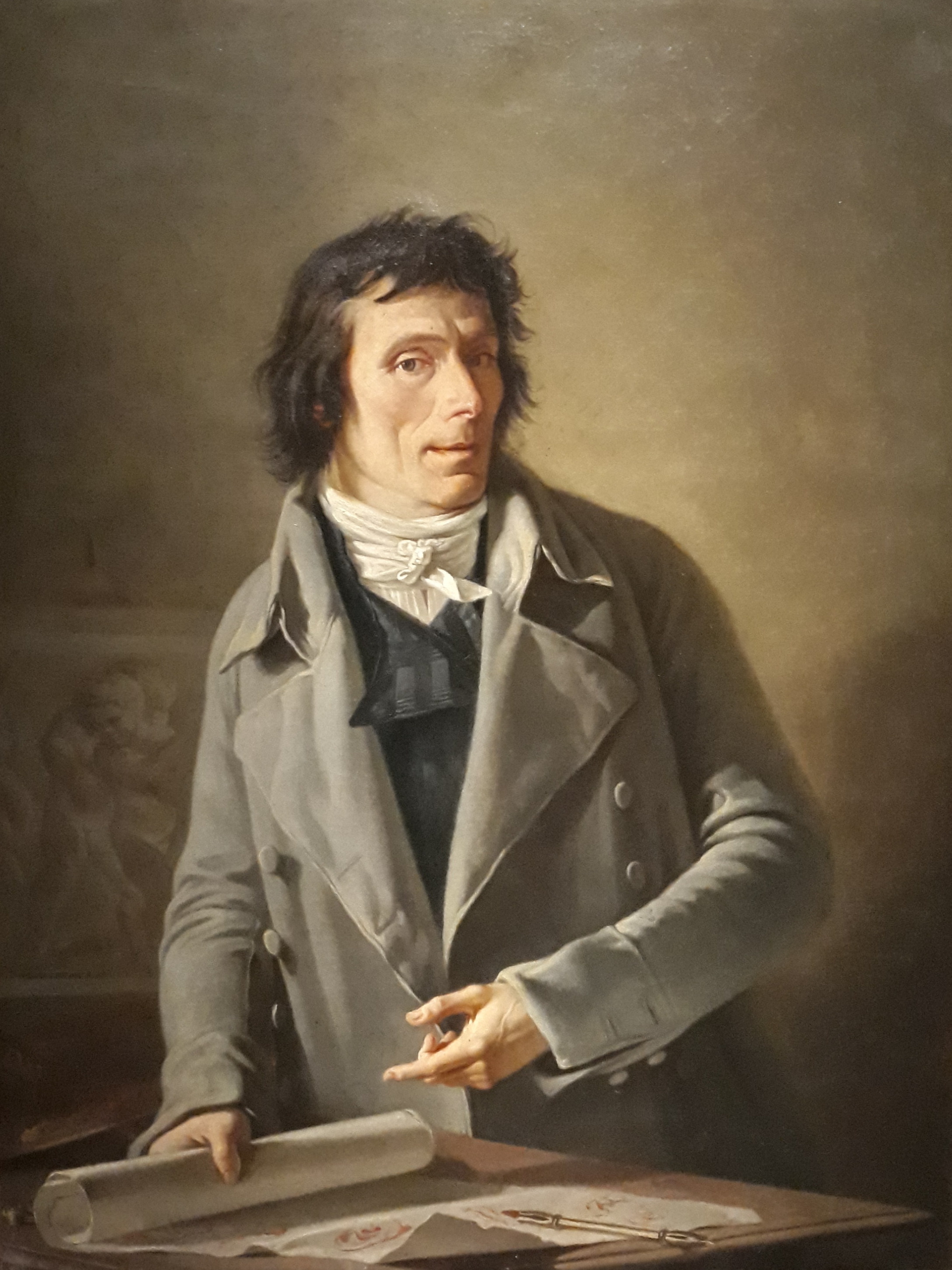 Autoritratto di Domenico Aspari